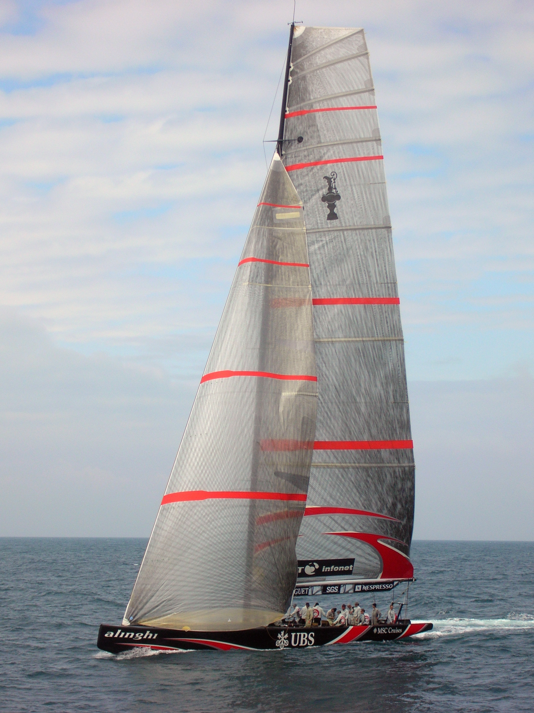 Alinghi SUI100 (avec voile non numérotée) lors d'un entraînement à Valence